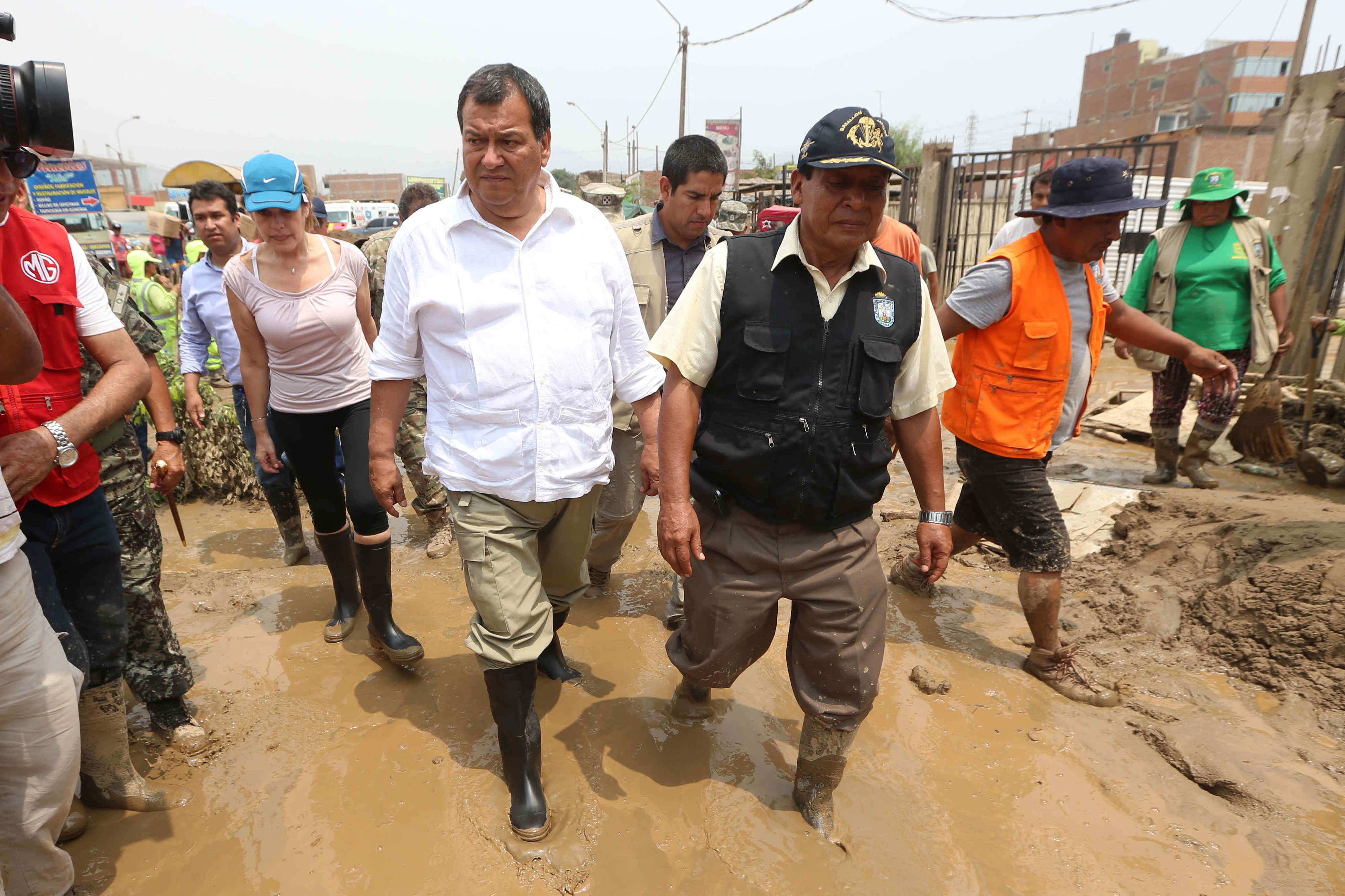 MINISTRO DE DEFENSA JORGE NIETO Y VICEPRESIDENTA MERCEDES ARÁOZ, LLEGARON A LA ENCALADA EN HUACHIPA PARA SUPERVISAR LABORES DE LIMPIEZA Y ENTREGA DE ALIMENTOS A LOS AFECTADOS POR EL DESBORDE DEL RÍO HUAICOLORO